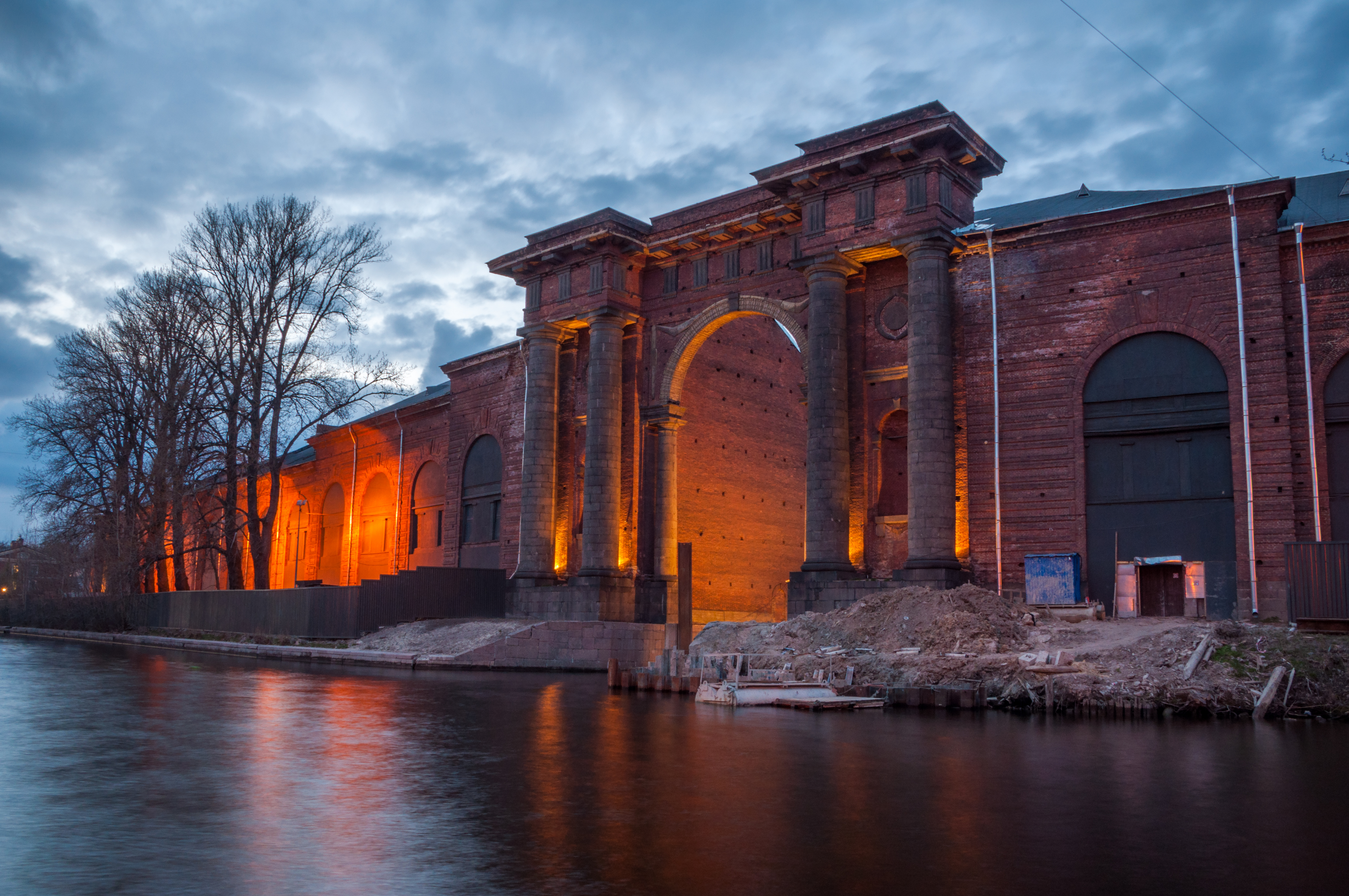 Лесные склады (три) с аркой: набережная р. Мойки, 103 (набережная Адмиралтейского канала, 2, 4), Адмиралтейский район, Санкт-Петербург